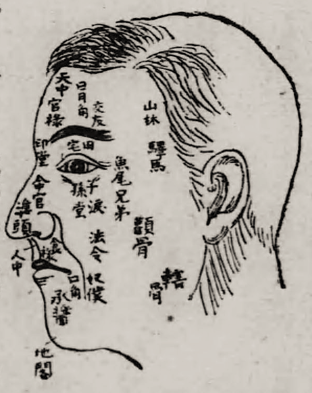 観相学における顔の各部の名前 国民の顧問 第６巻 - (日本国民協会出版部, 1918)